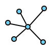 star network diagram